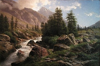 Het schilderij Partie am Fischbach im Sulztal in Tirol (Berlijn, 1880) van de Duitse schilder Georg Hermann Engelhardt (1855-1934)